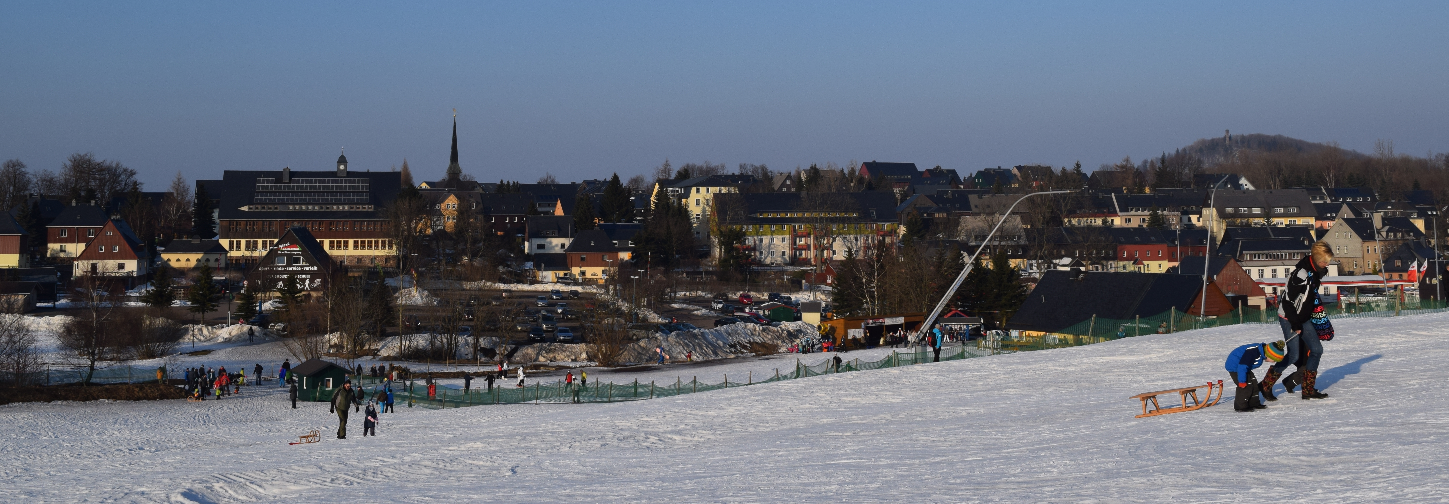 Altenberg (Panorama)